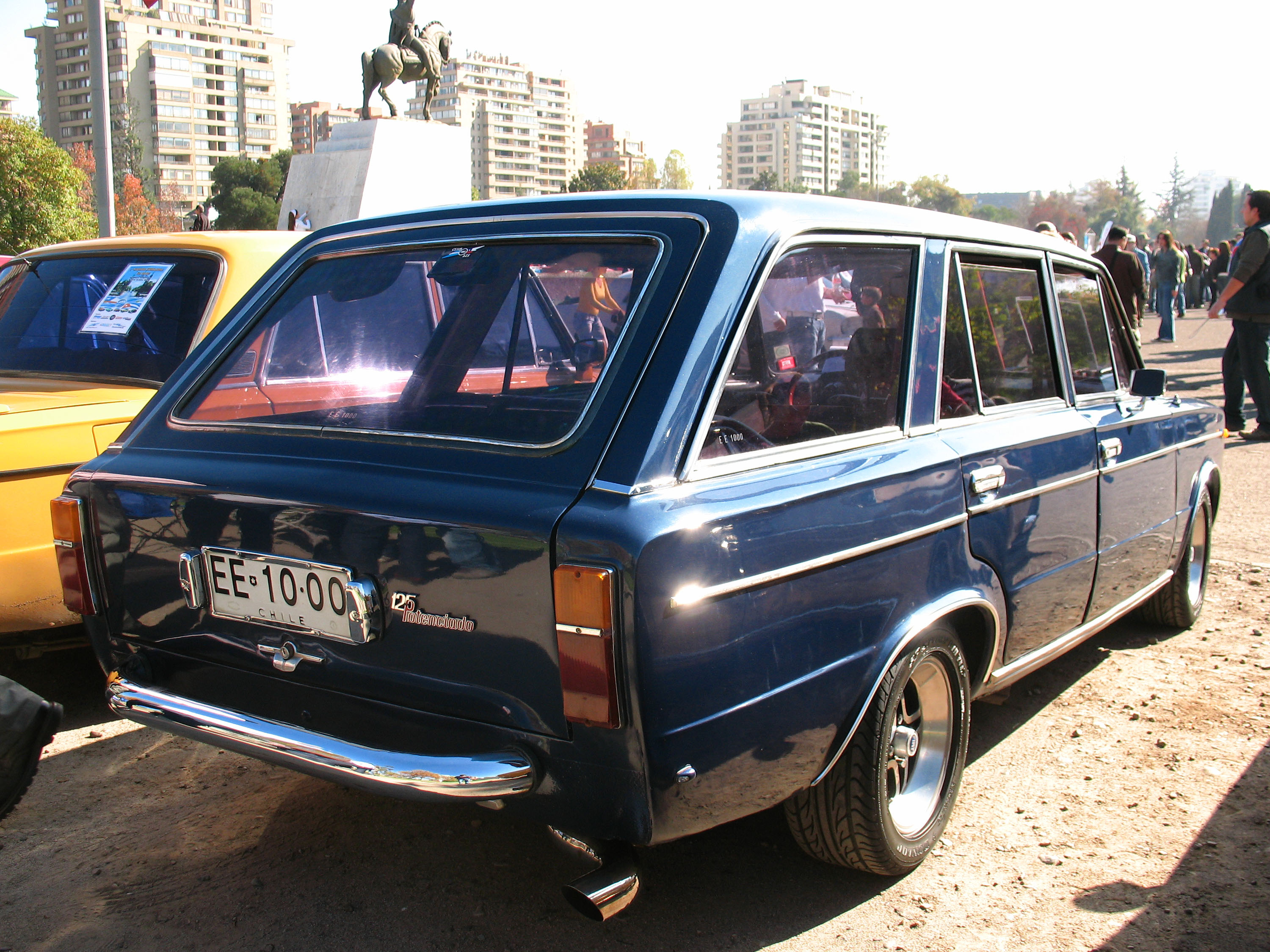 Fiat 125 Potenciado Familiar 1978